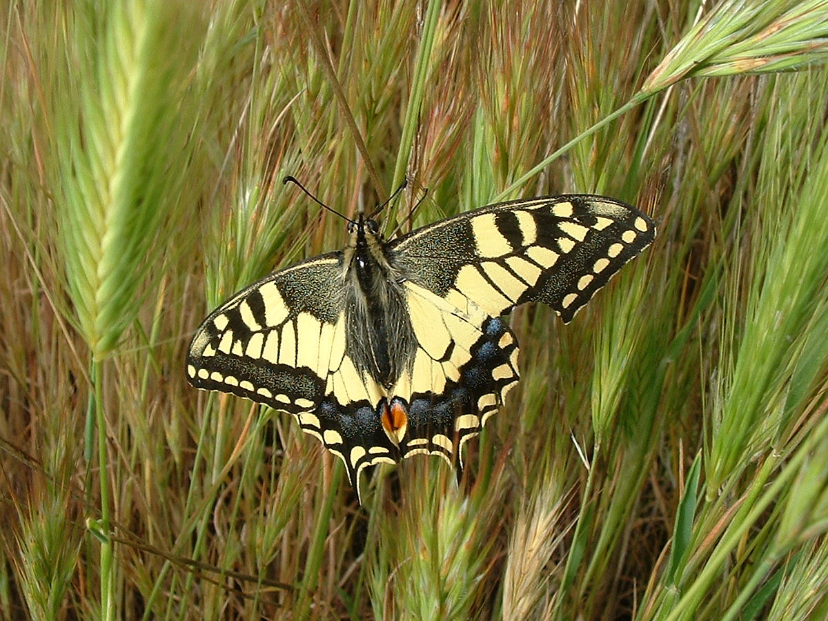 Papilio machaon (Papiolionidae). Rivas Vaciamadrid, Madrid, España.